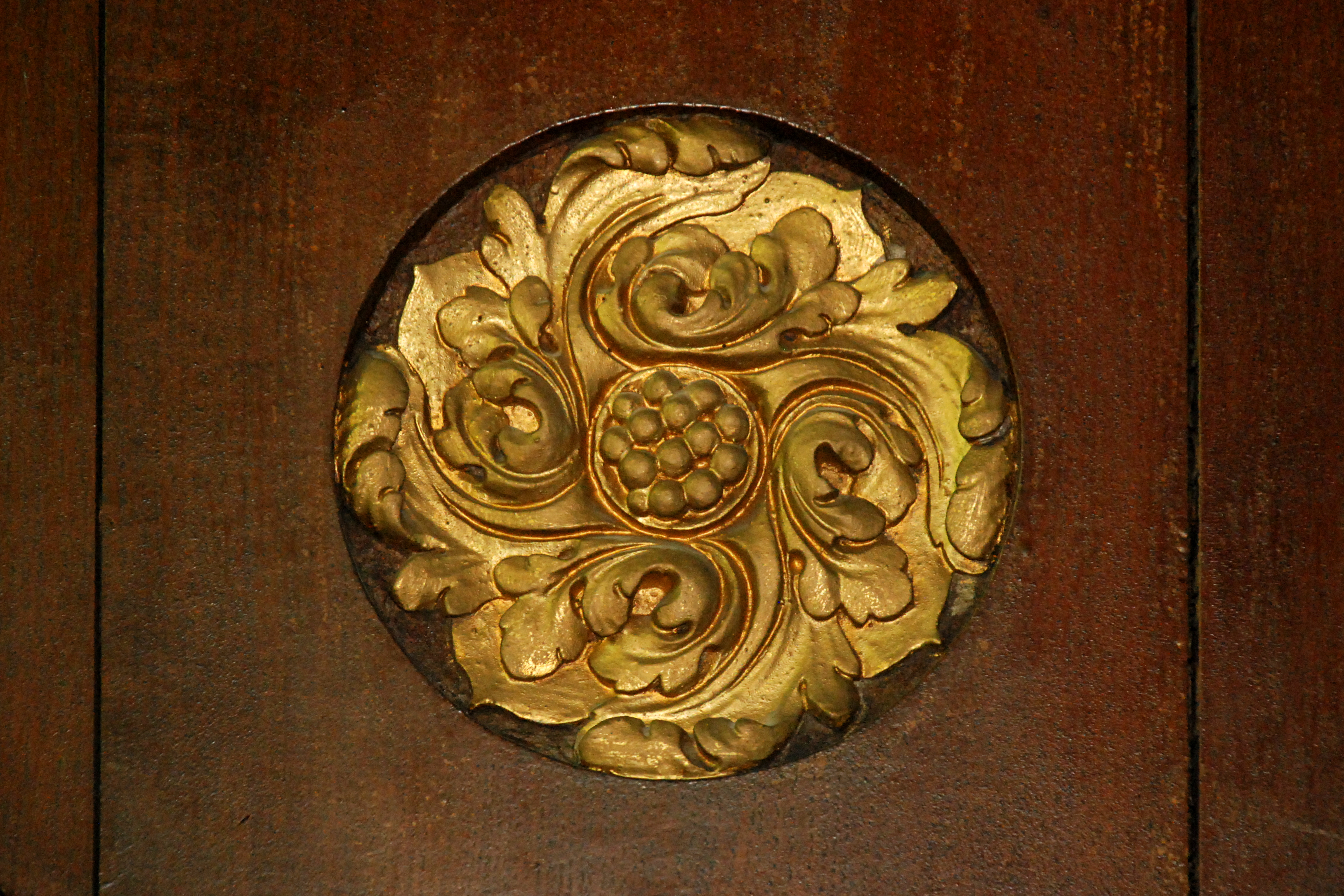 Belgique - Brabant wallon - Église de Court-Saint-Étienne